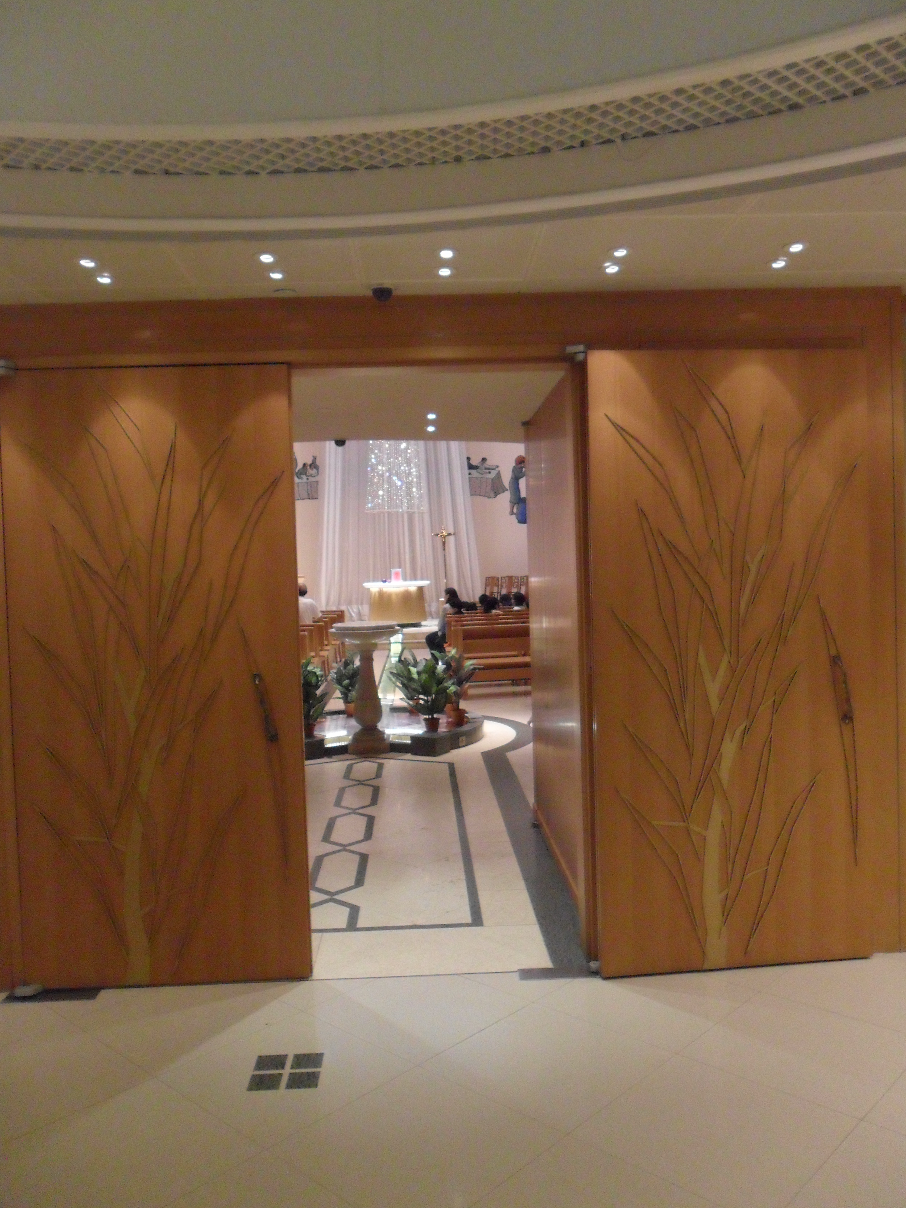 中文（香港）: 聖母聖衣堂, 香港, 中國